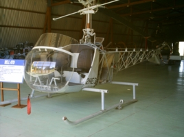 Helicoptero Bell 47 D 2-He-3.